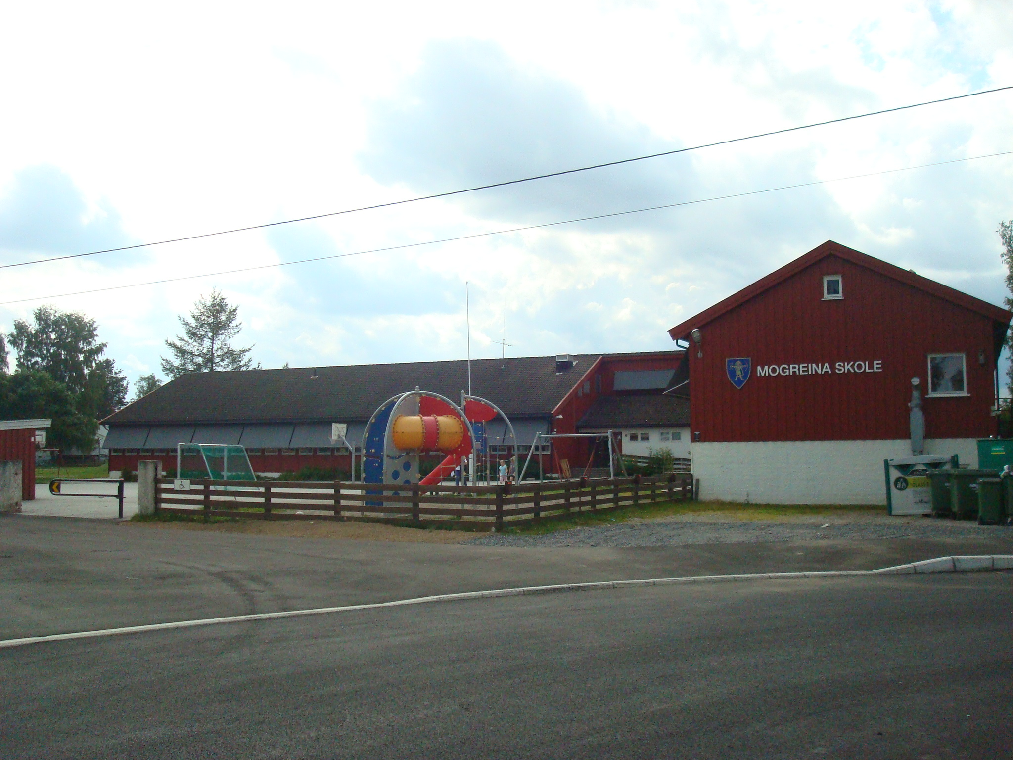 Mogreina skole i Akershus.